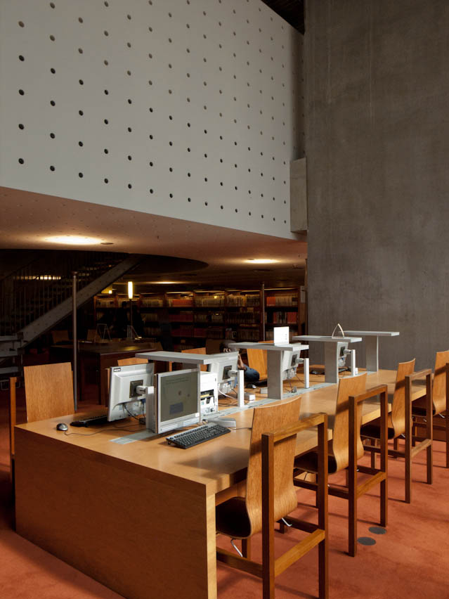 Bibliothèque nationale de France Site Tolbiac